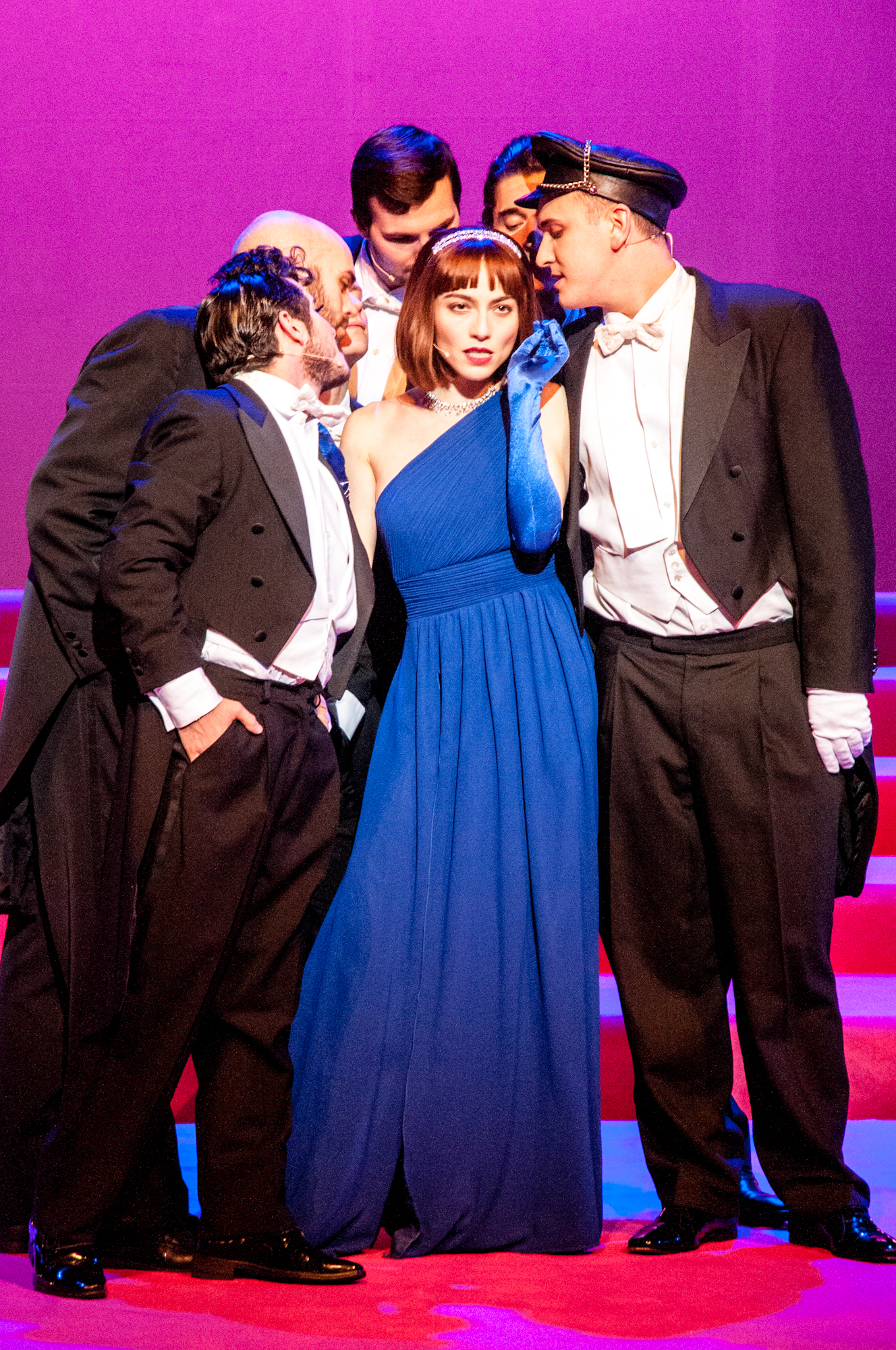 Alexia Macbeth & boys